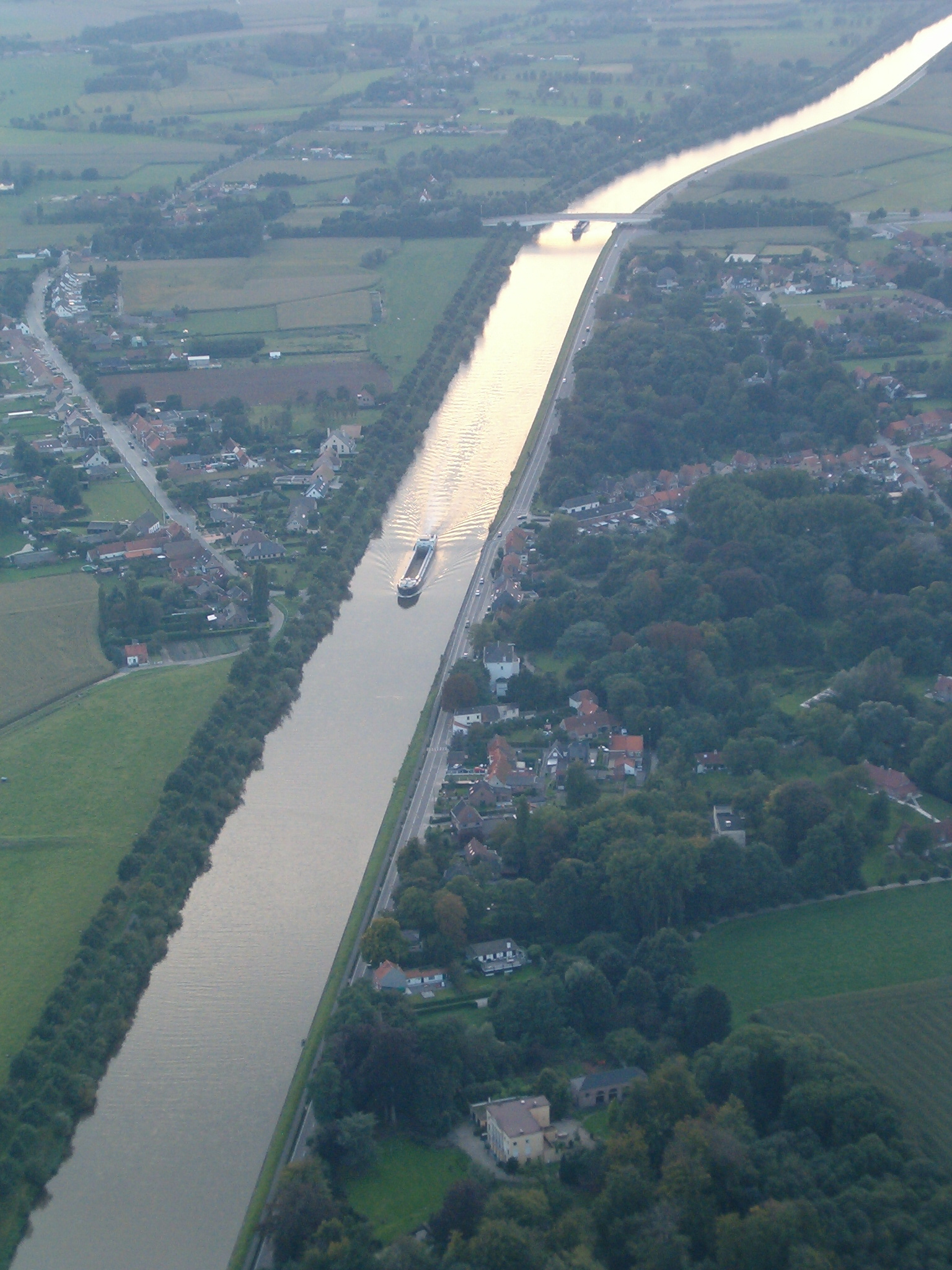 Lovendegem - Vinderhoute, Belgium